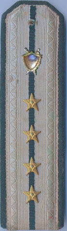 Погон юриста 1-го класса образца 1943 г.